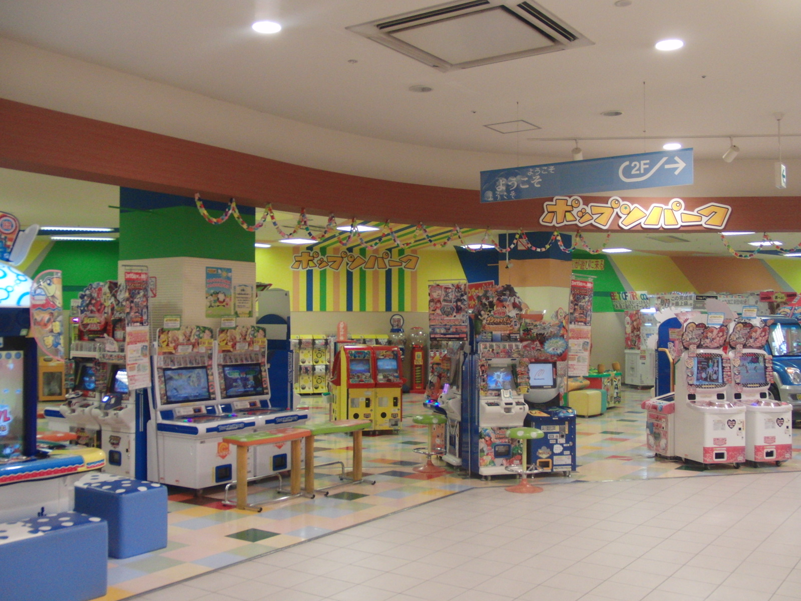 ポップンパーク東大阪店を撮影。現在はモーリーファンタジー東大阪店となっている。